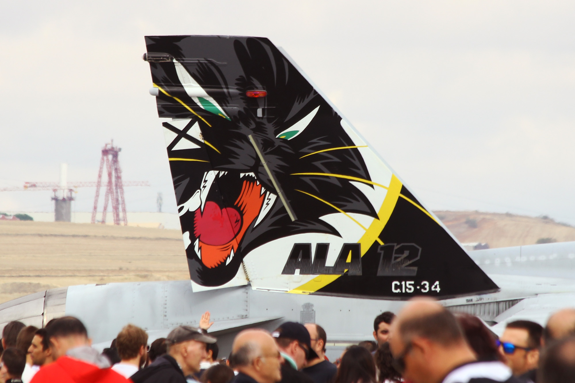 Festival Aéreo Internacional Aire75, celebrado el 11 de octubre de 2014 en la Base Aérea de Torrejón de Ardoz, Madrid, con motivo del 75º aniversario del Ejército del Aire de España. Aire75 International Airshow, held on October 11, 2014 at the Torrejón de Ardoz Air Base, Madrid, to celebrare the 75th anniversary of the Spanish Air Force.